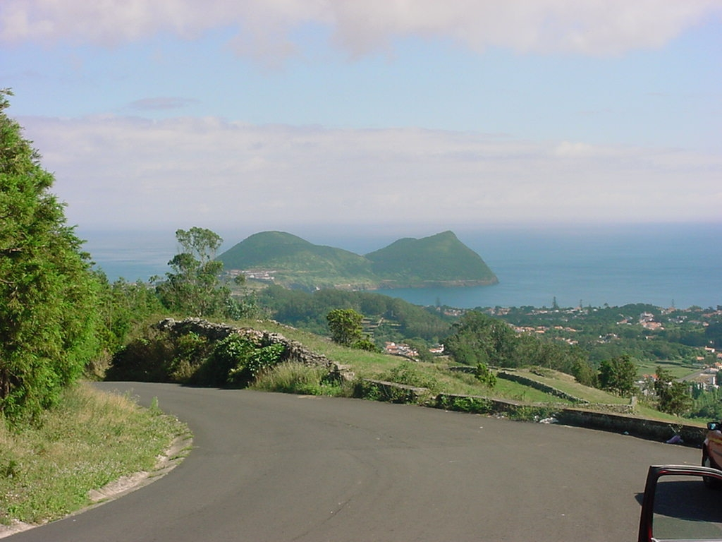 Freguesia da Terra Chã, Miradouro das Veredas, vista sobre o Monte Brasil, ilha Terceira, Açores, portugal.